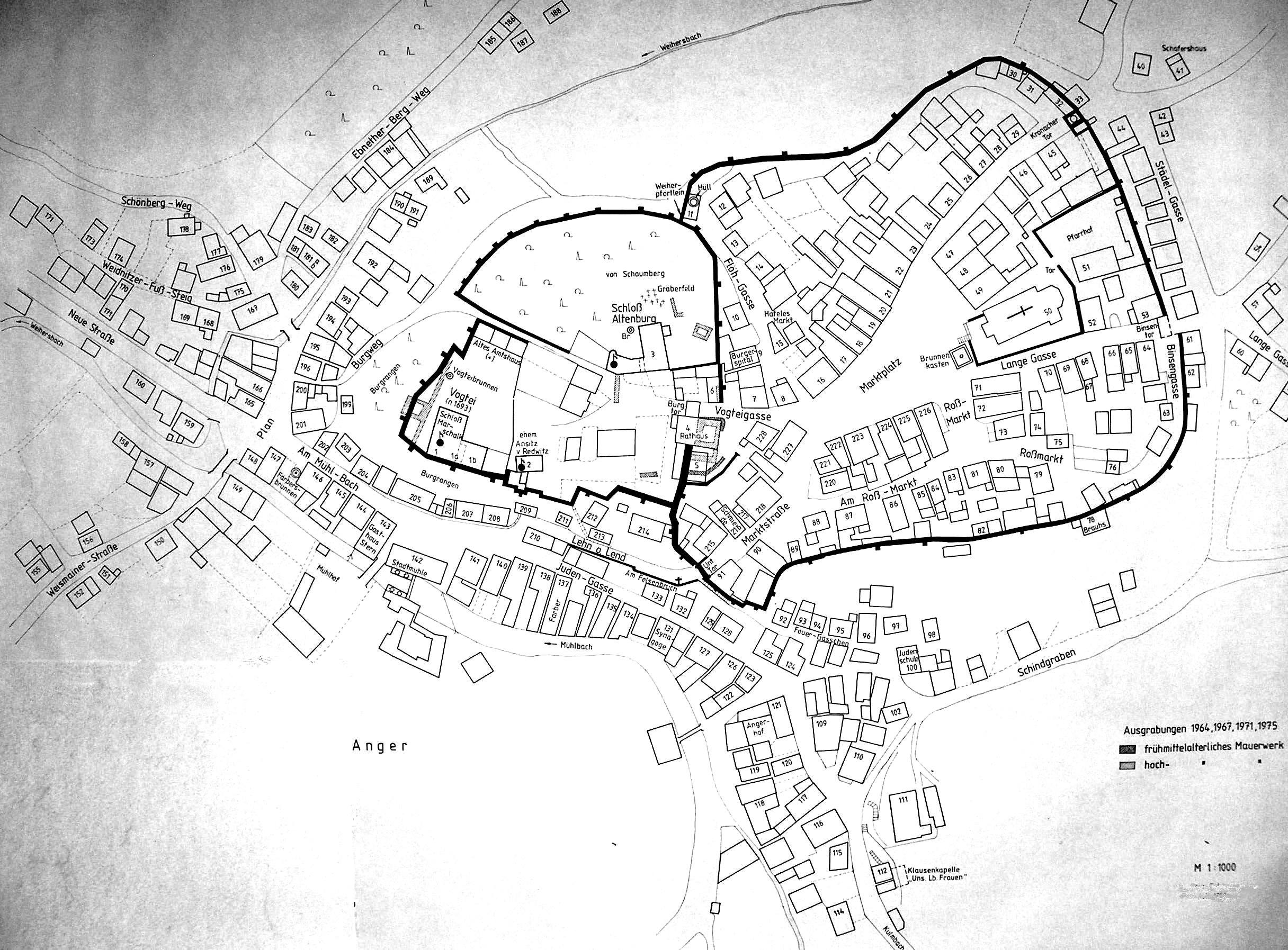 Detallierter Stadtplan Burgkunstadts der Verhältnisse um 1853